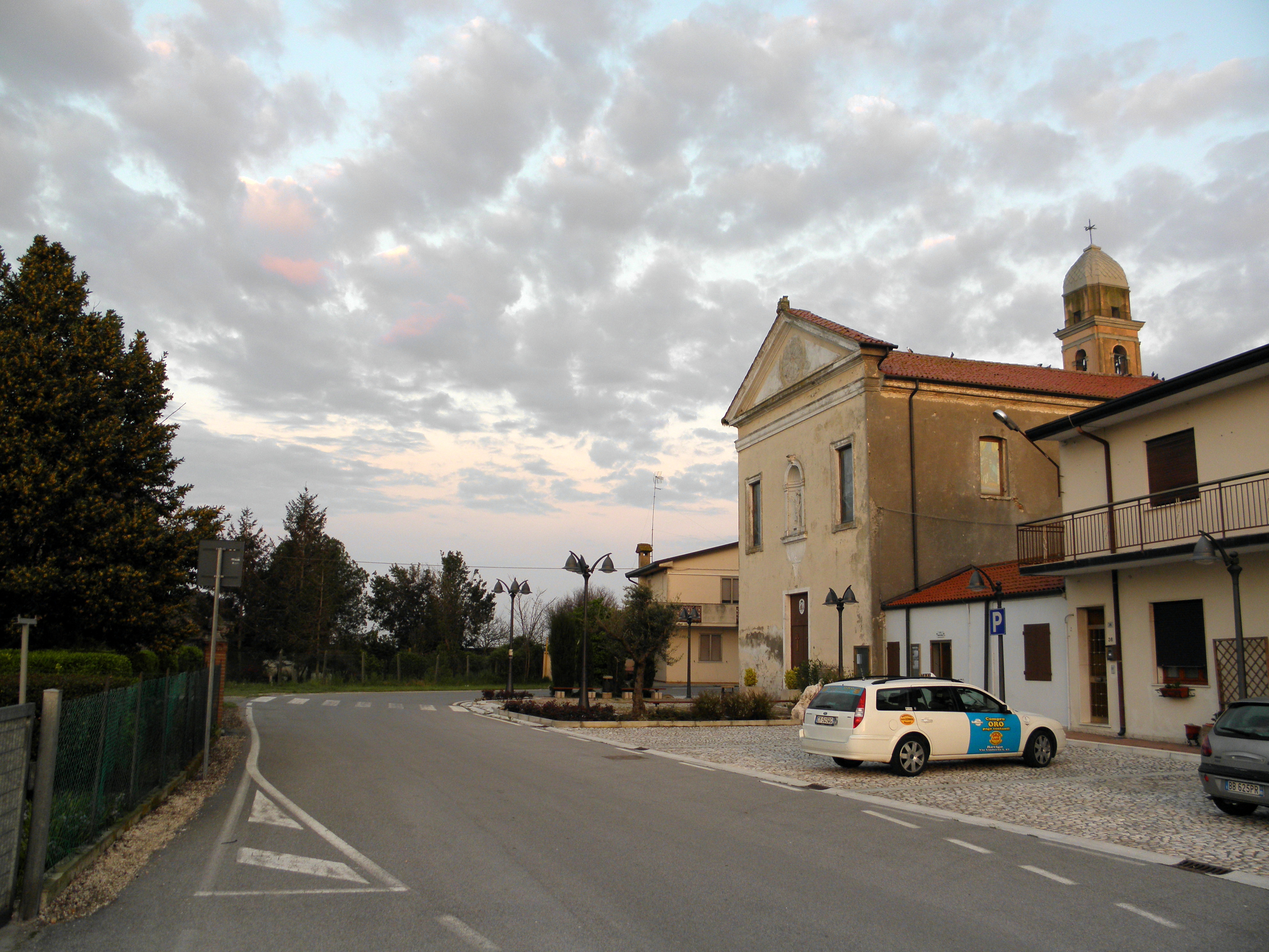 Ca' Cappello, frazione di Porto Viro; piazzetta e chiesa di San Giovanni Battista.